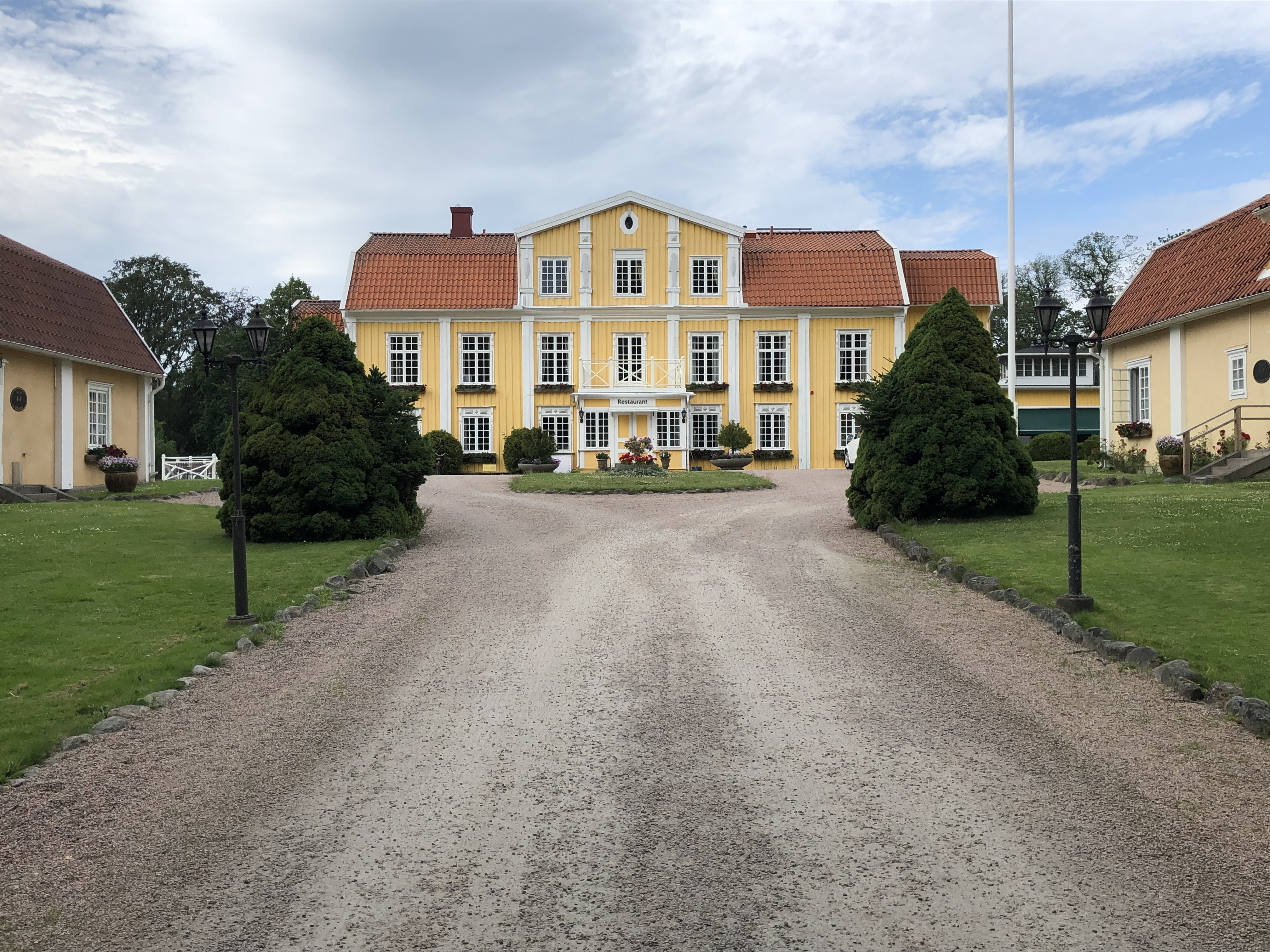 Ronnums herrgård 2019